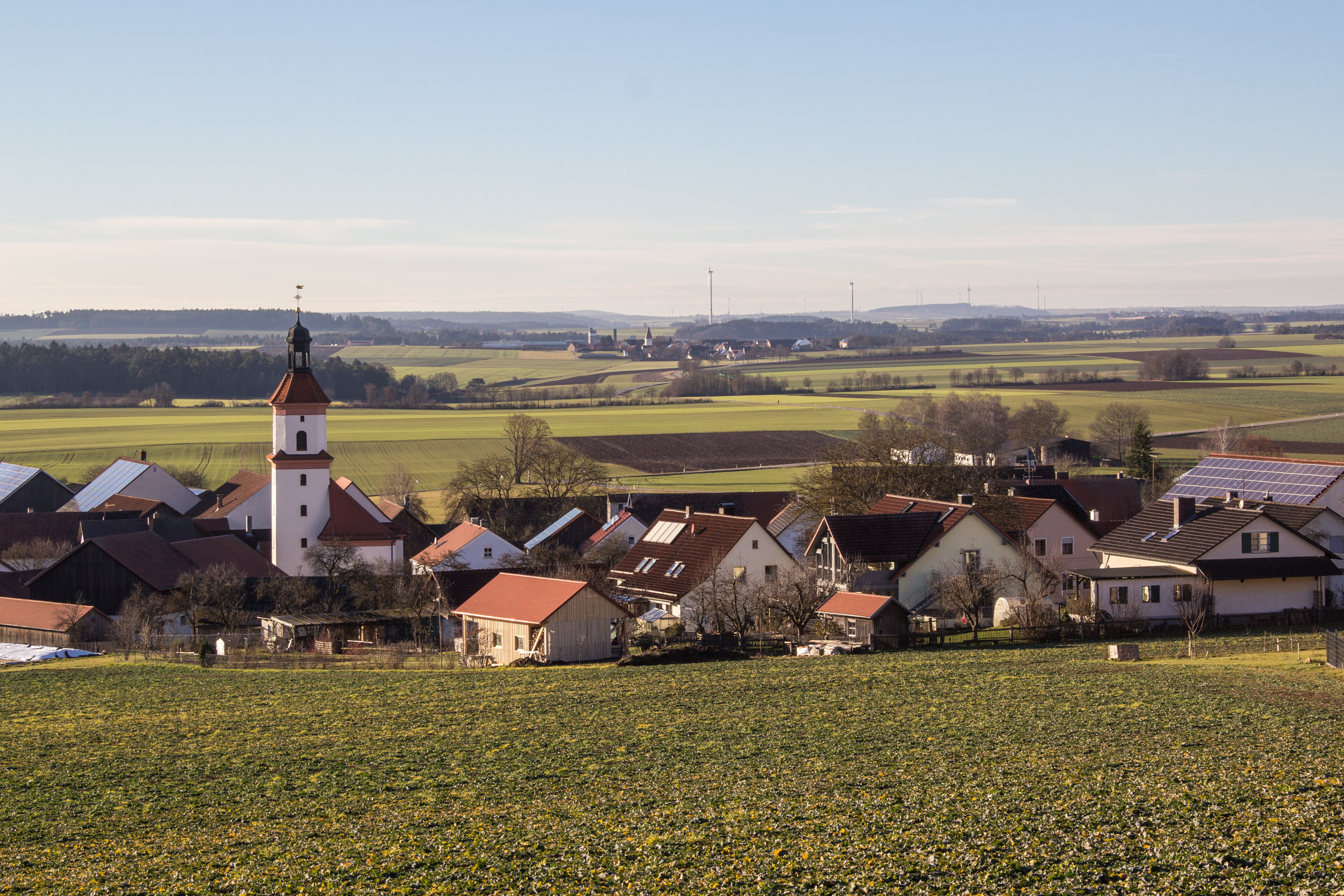 Euerwang